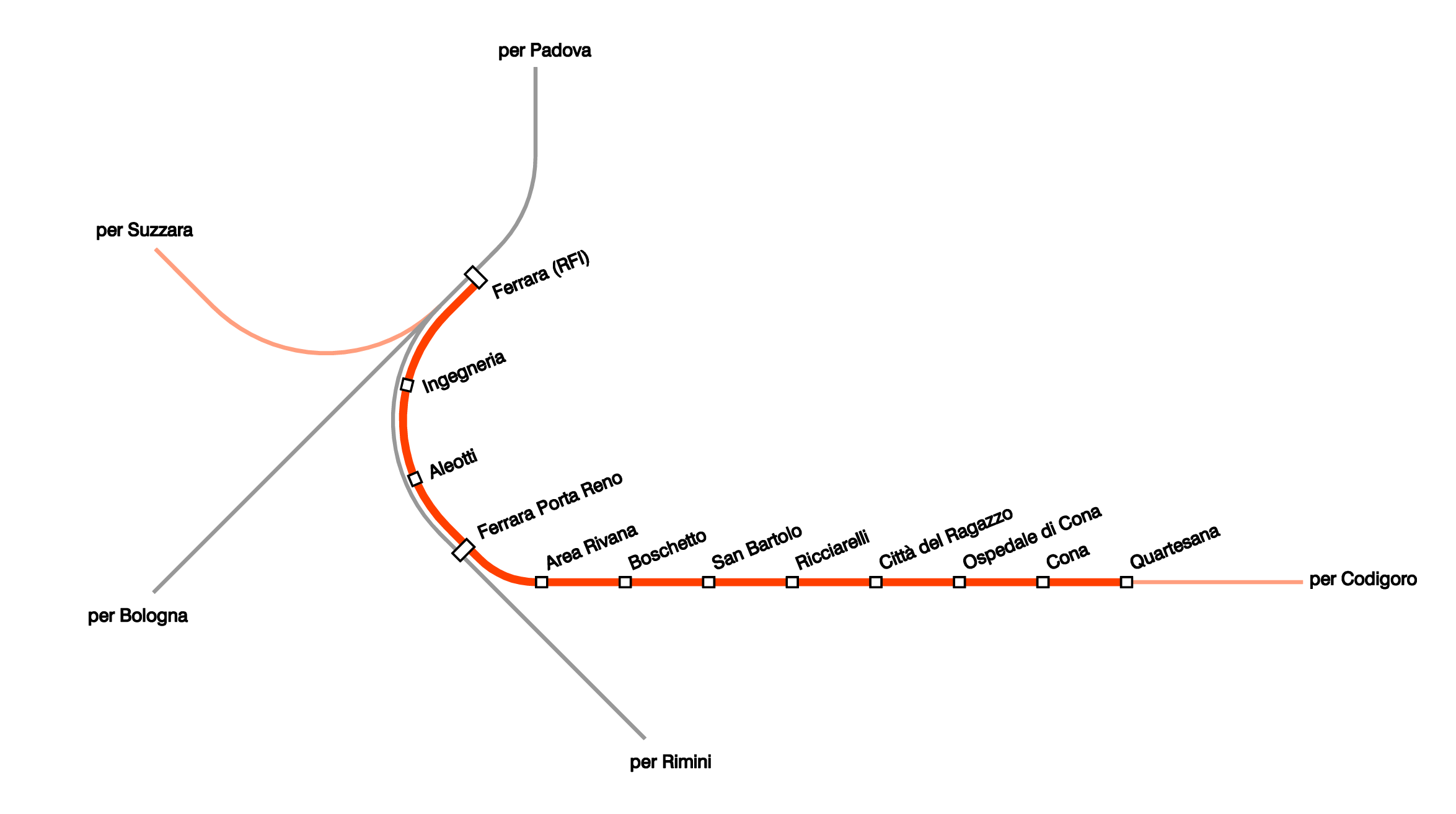 Progetto del servizio ferroviario metropolitano di Ferrara, sulla linea per Codigoro delle FER.